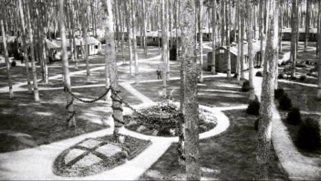 крест